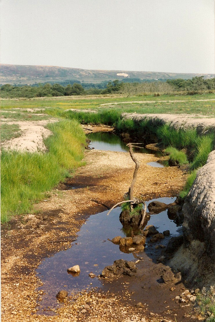 L'Ellez presque à sec près de sa source dans la traversée du marais du Yeun Elez au pied du mont Saint-Michel-de-Brasparts et en amont du Réservoir de Saint-Michel